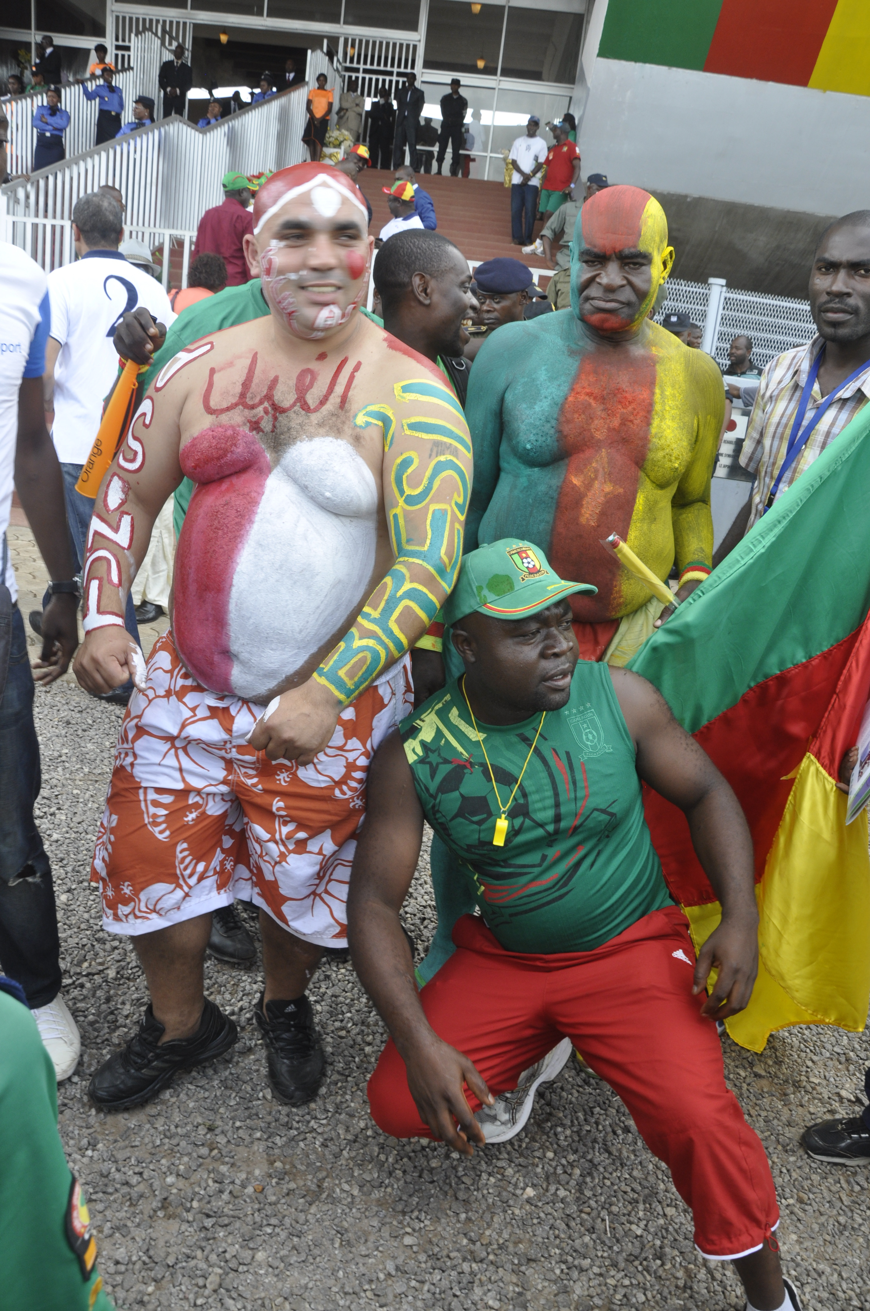 Groupe de supporters de plusieurs pays This is an image of Cultural Fashion or Adornment from Cameroon